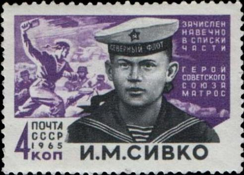 Почтовая марка СССР - Сивко Иван Михайлович, Герой Советского Союза